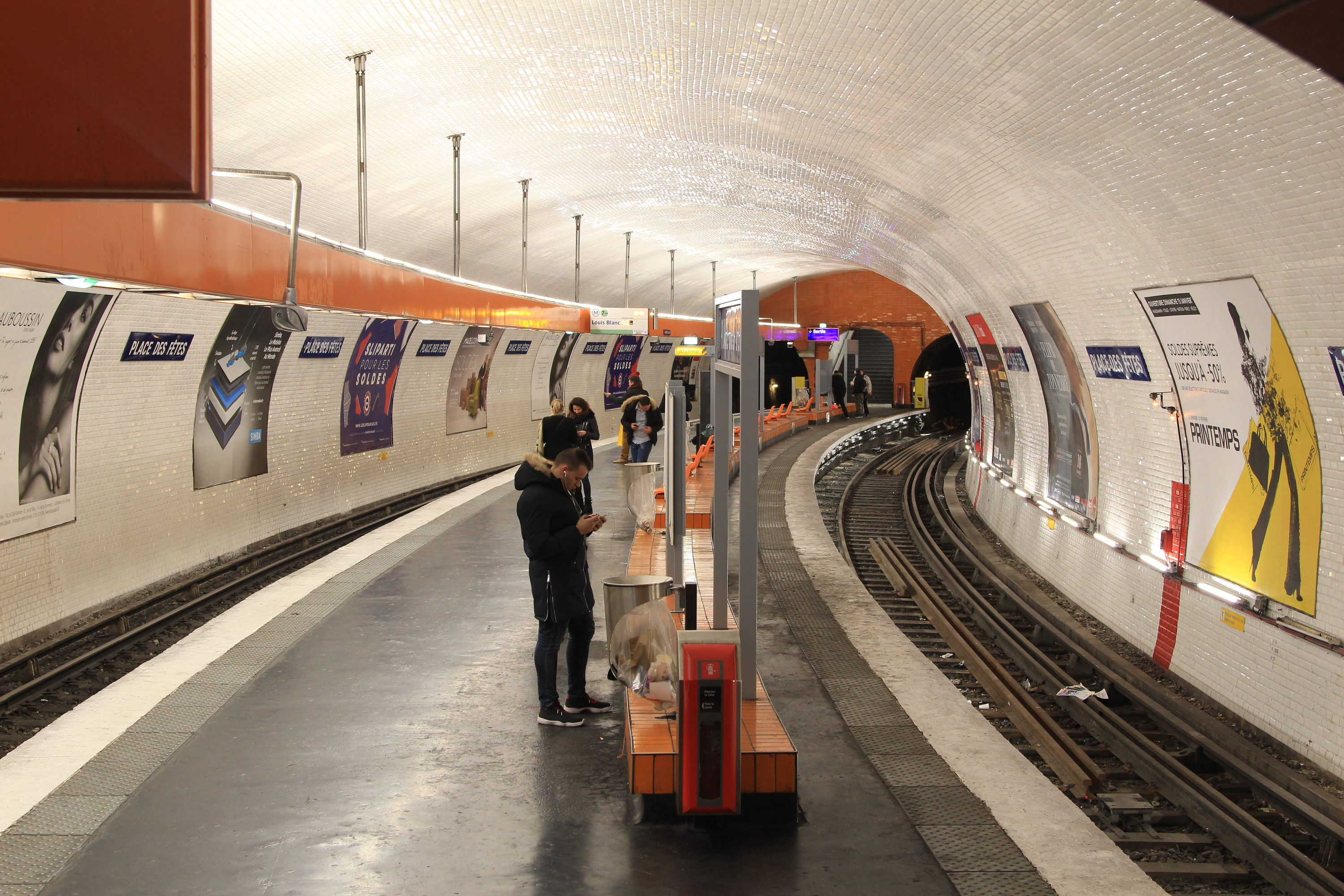 Quai de la station de métro parisien Place des Fêtes de la ligne 7 bis.